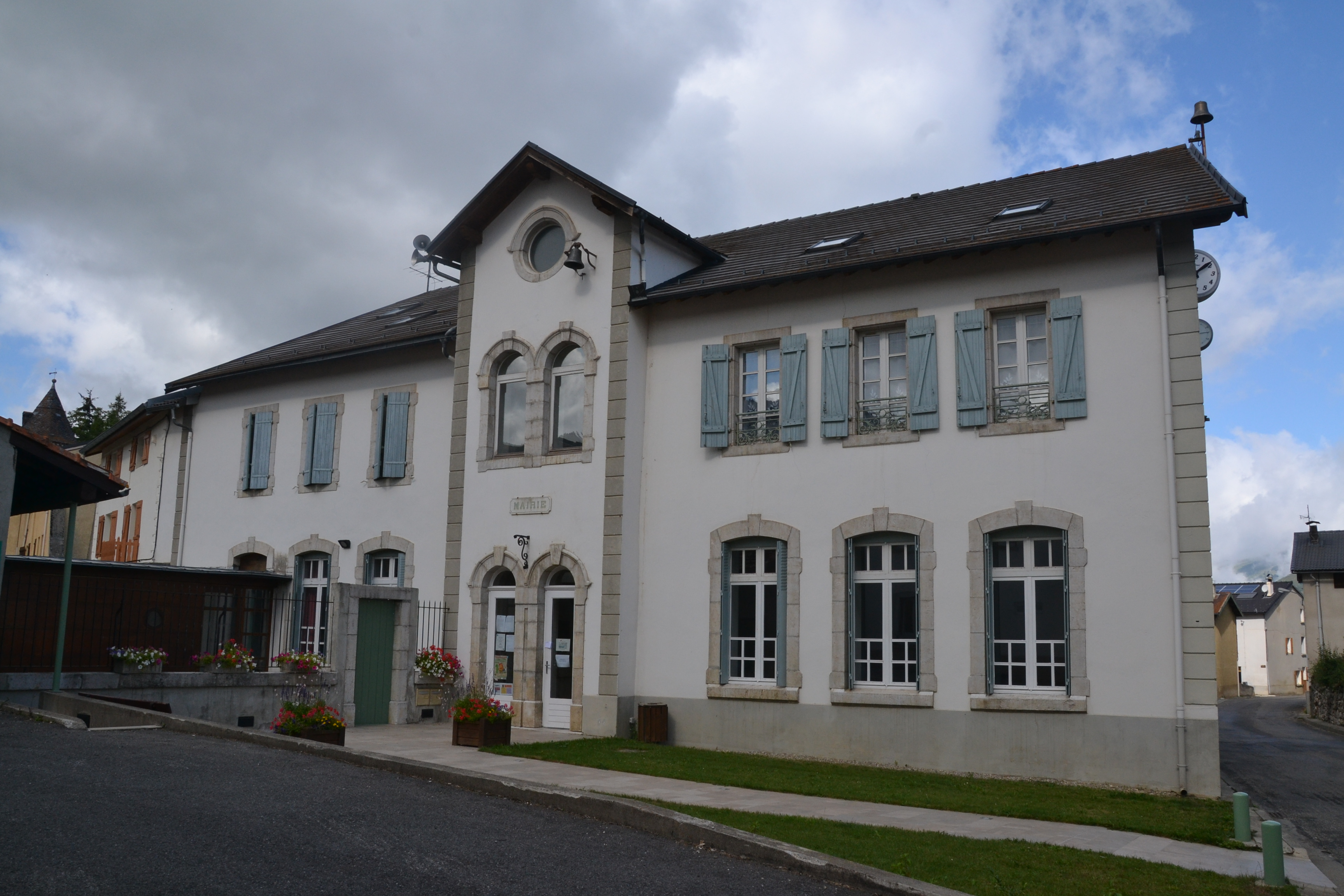 Mairie de Camurac (Aude, France).